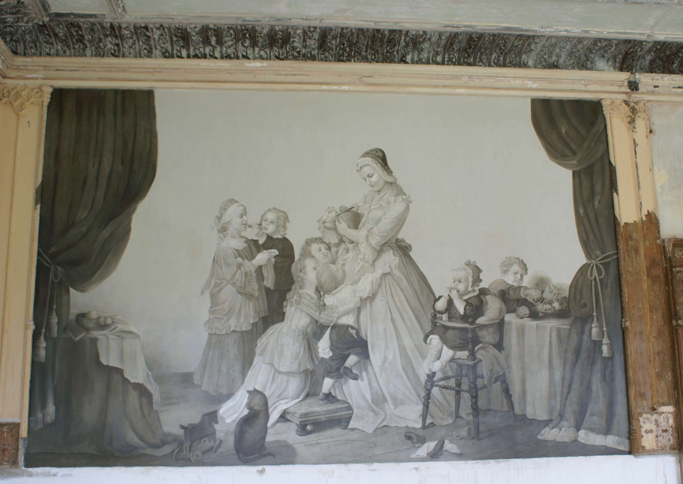 Kartlow Landkreis Demmin - Schloss: Wandbild im Damenzimmer (nicht signiert, vor 1885 entstanden)